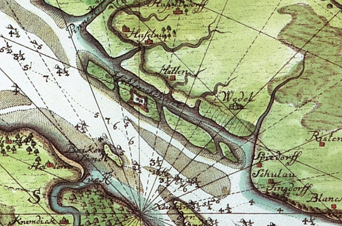 Die Hetlinger Schanze um 1721 von Samuel Gottlieb Zimmermann und Otto Hasenbanck